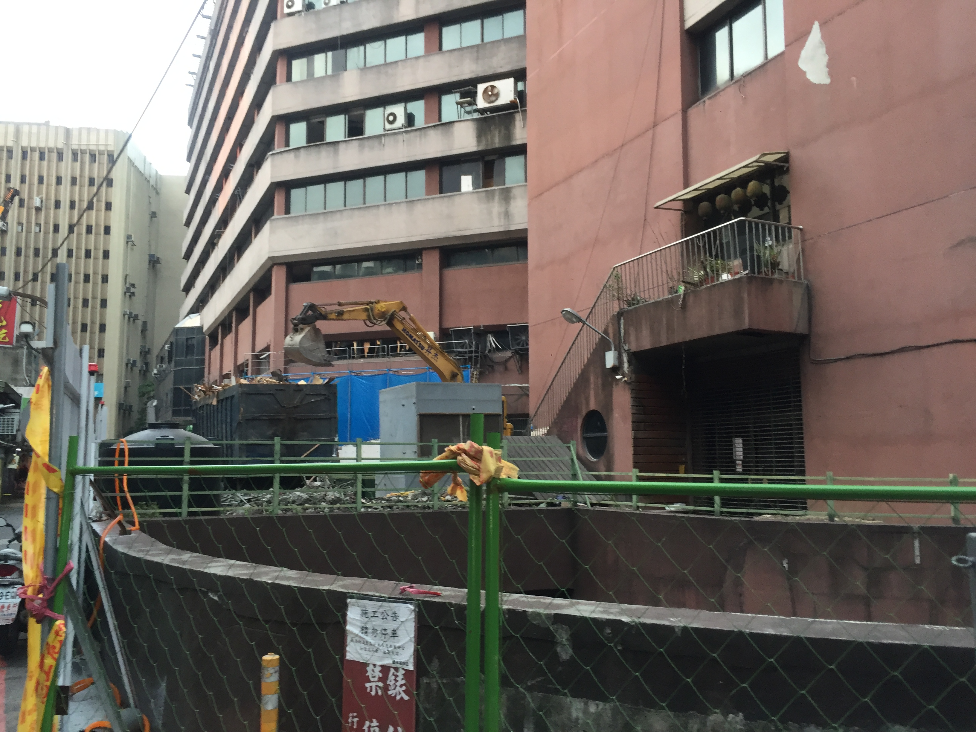 南海路二巷內舊（原）南門市場拆遷工程(第一期) 原第三出口處